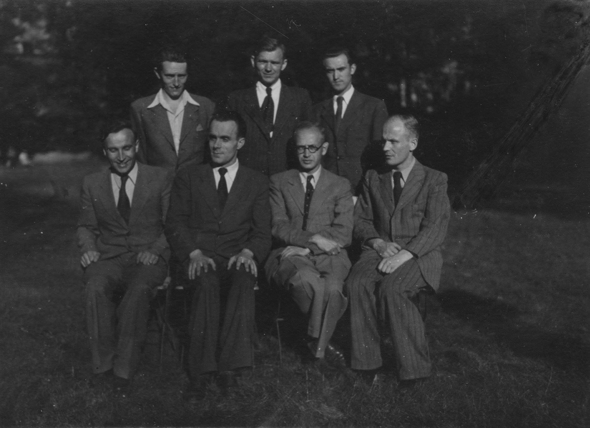 Управа ЦЕСУС, Відень, літо 1946 р. Сидять: невідомий, Василь Рудко, Євген Пизюр, Володимир Кучер; стоять: Іван Лисяк-Рудницький, Омелян Пріцак, Богдан Цимбалістий. Фото з приватної колекції Максима Пизюра - сина Євгена Пизюра.